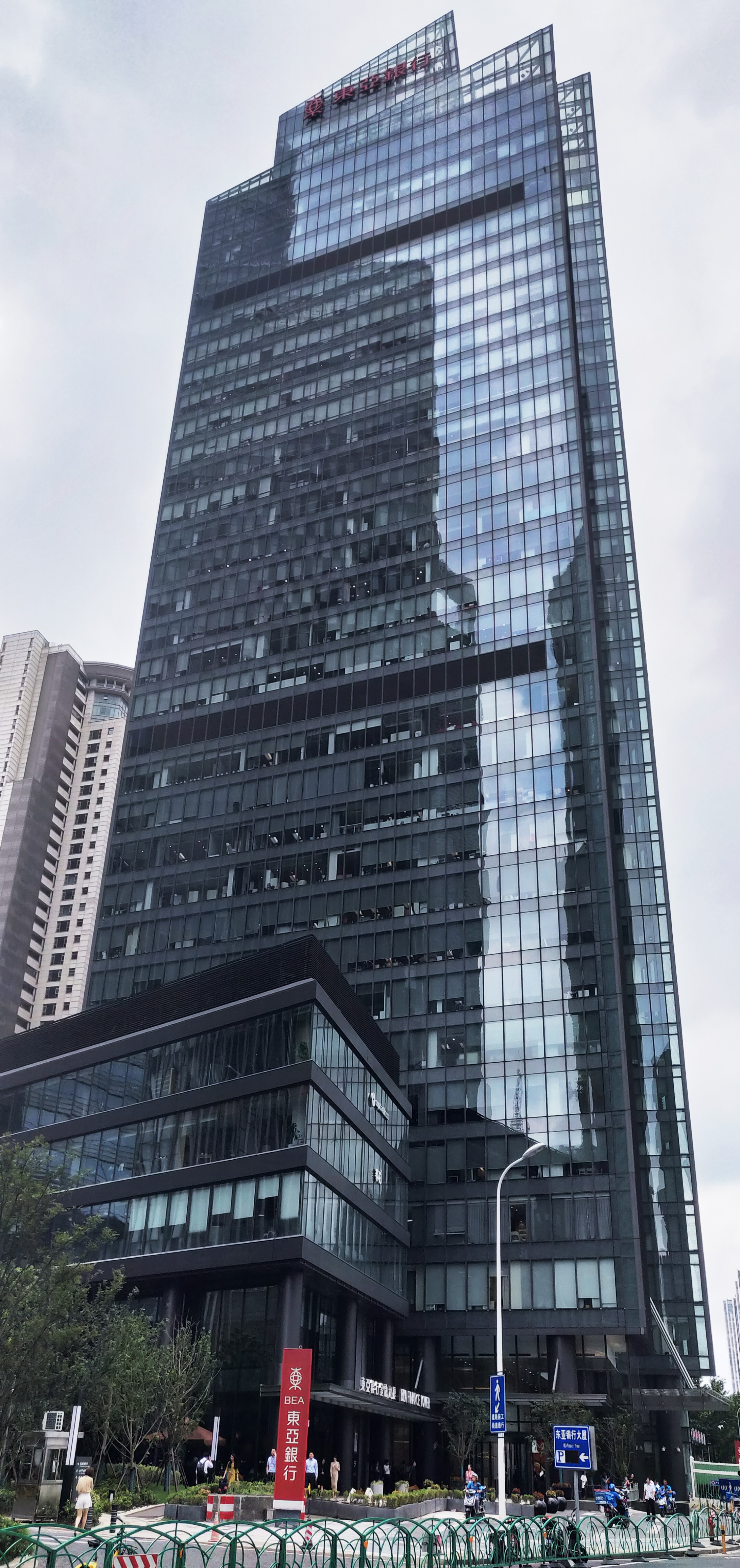 上海的东亚银行金融大厦。